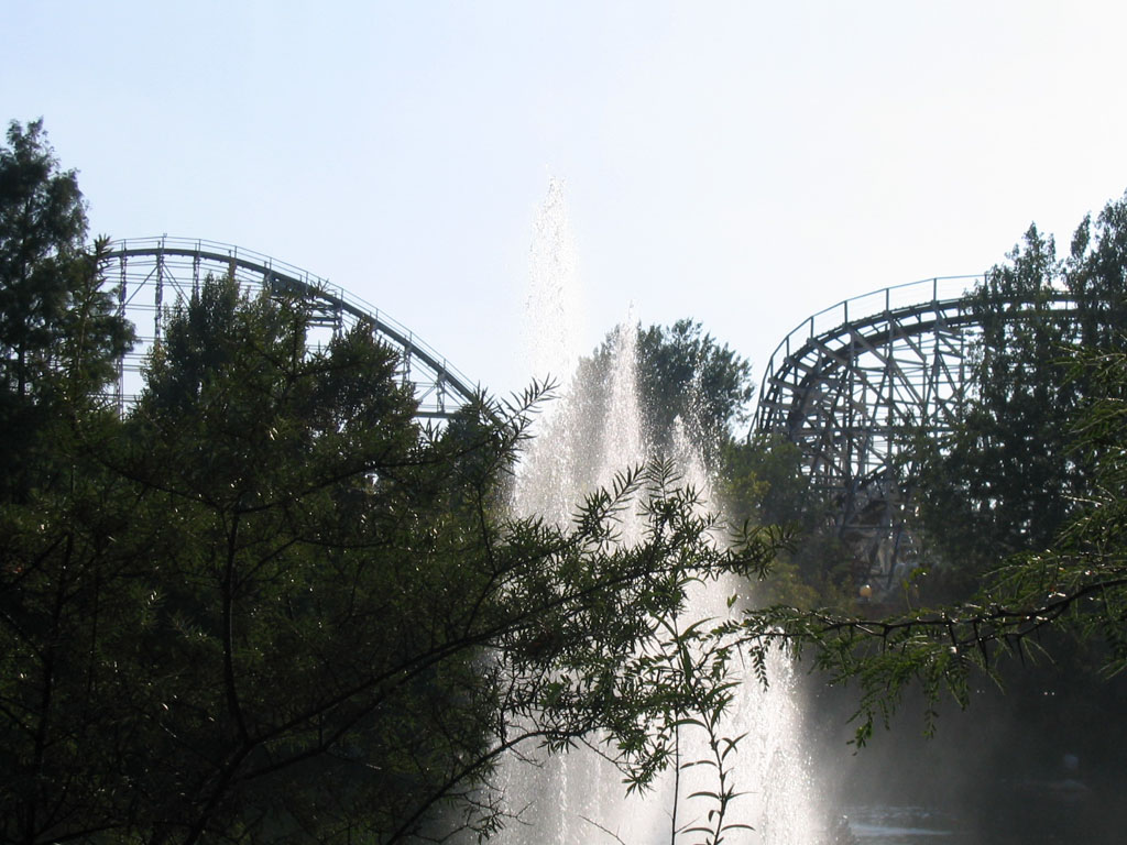 Sierra Tonante